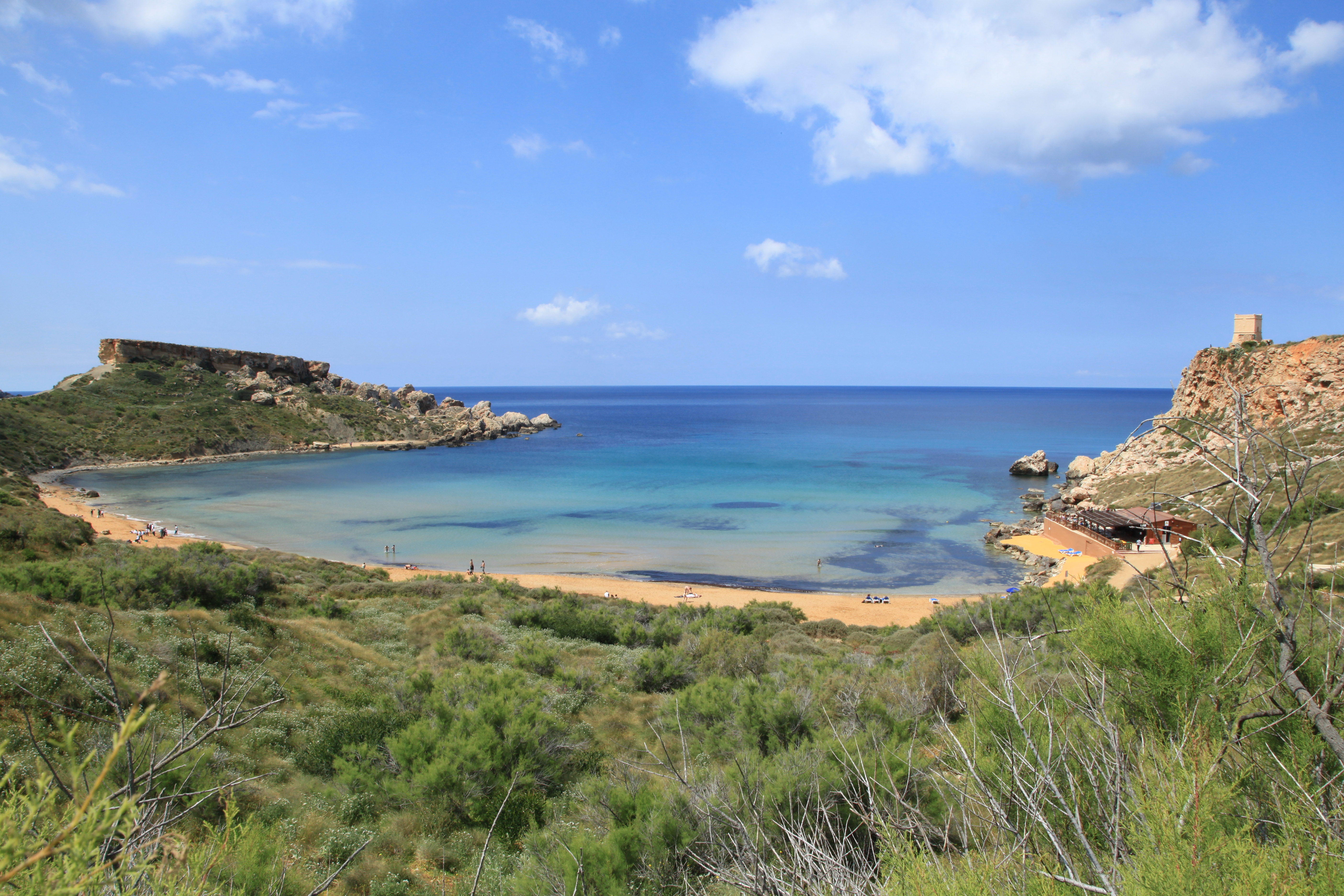 Għajn Tuffieħa Bay and Il-Karraba peninsula, Għajn Tuffieħa nature reserve in Mġarr, Malta